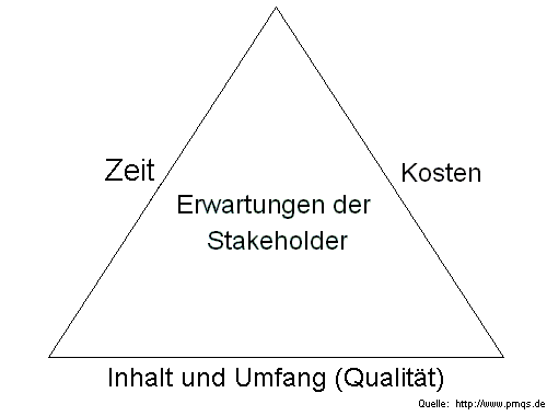 Darstellung des "magischen Dreiecks in der Projektsteuerung" (2006).